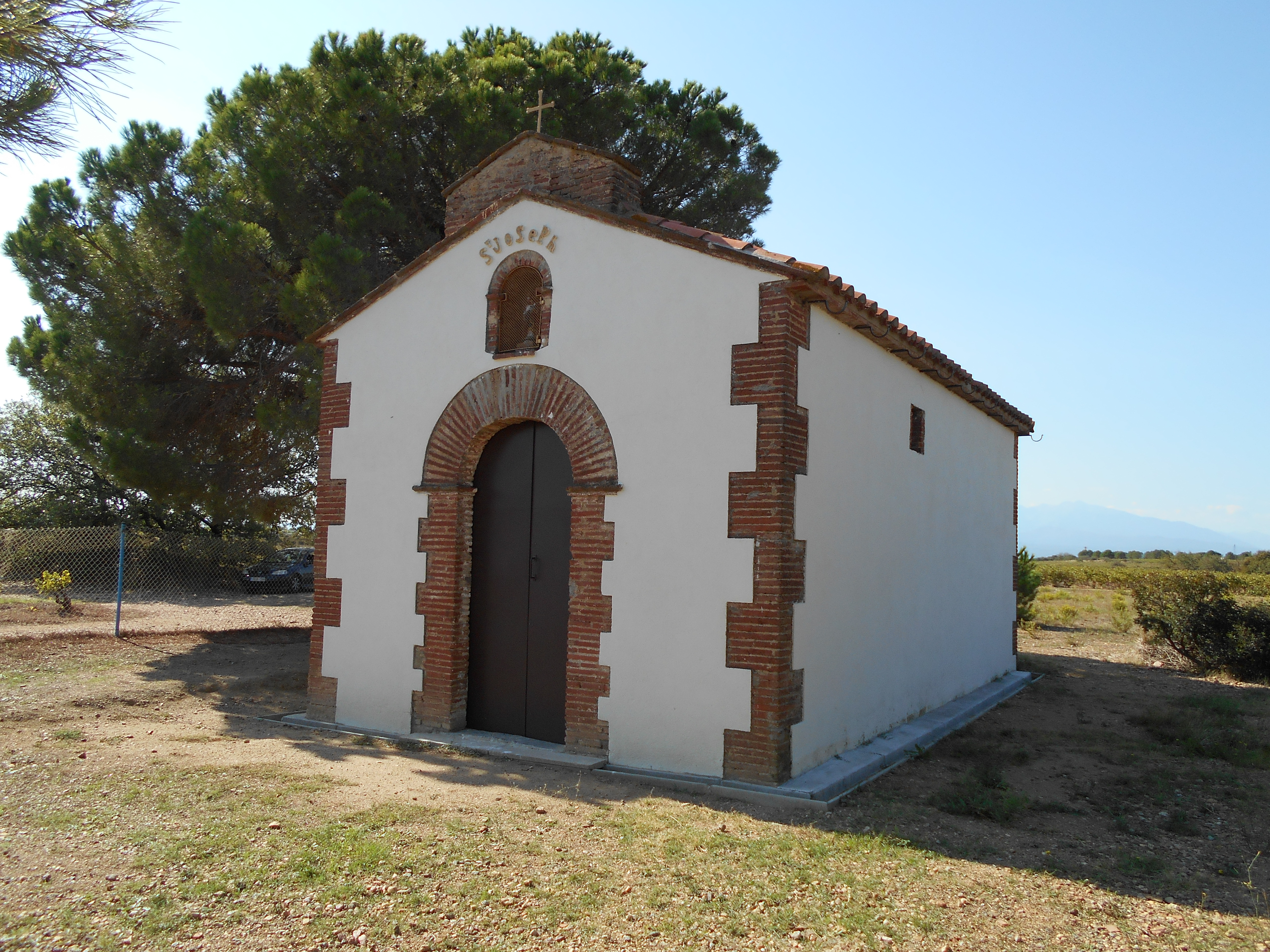 Façana meridional de la capella